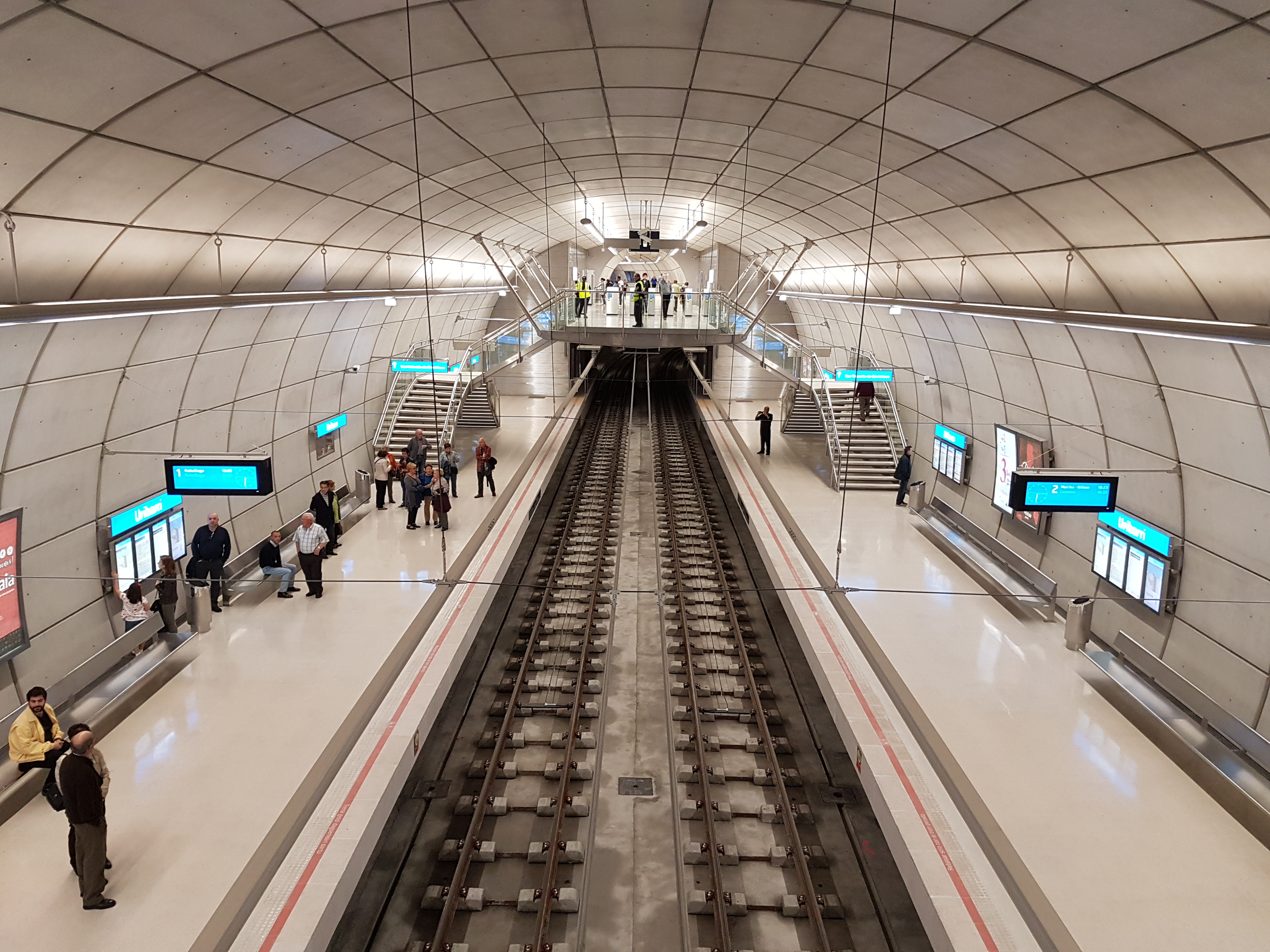 Estación de Uribarri.